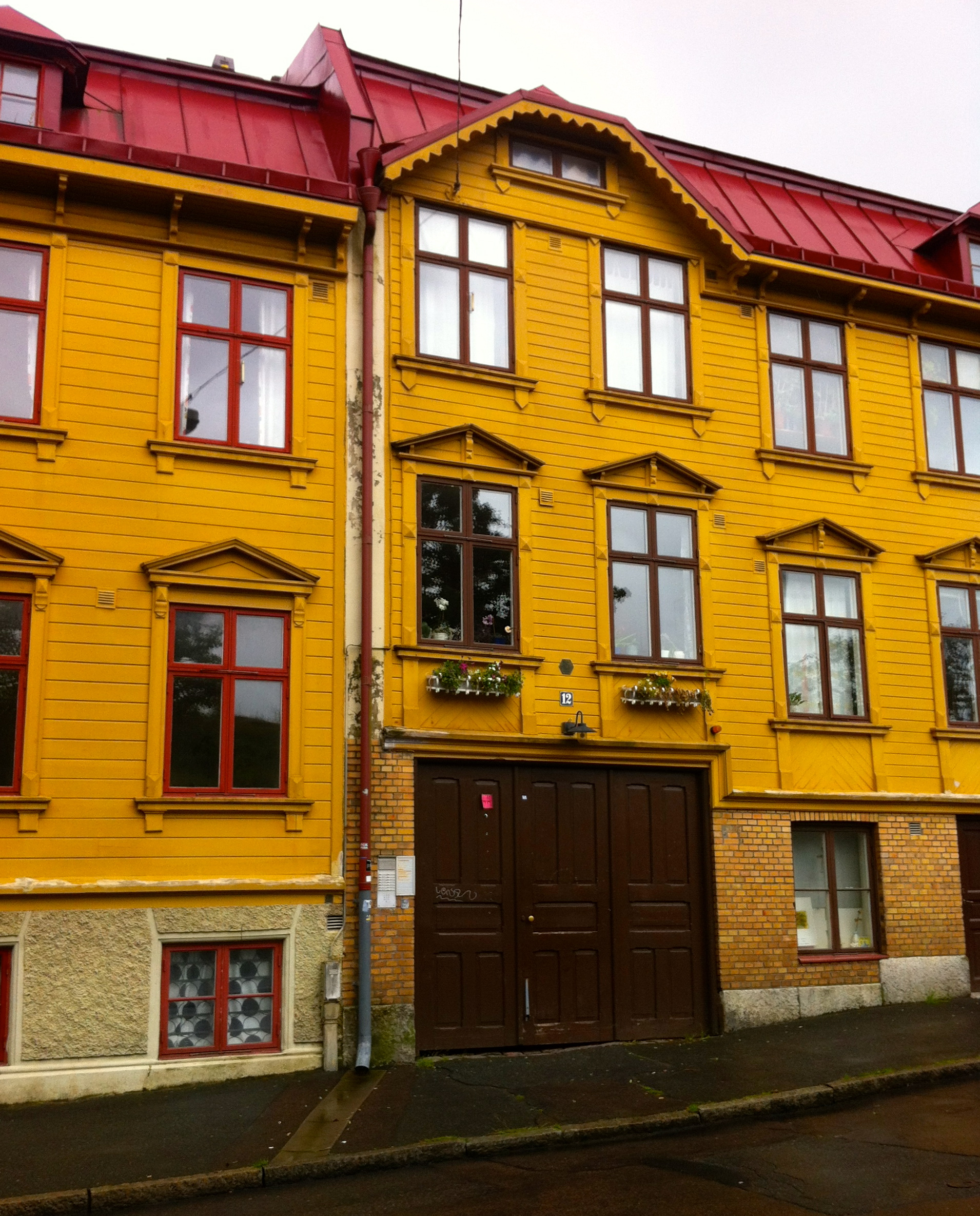 Mötet mellan huskropparna på Repslagaregatan och Storebackegatan, Kvarteret Skogen.